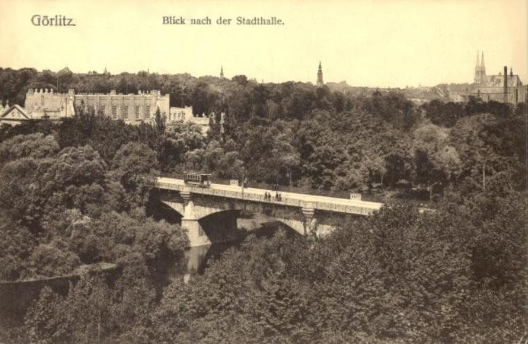 Die ehemalige Reichenberger Brücke (heute: Stadtbrücke) mit querender Straßenbahn in die Oststadt um 1900, sowie die Stadthalle.